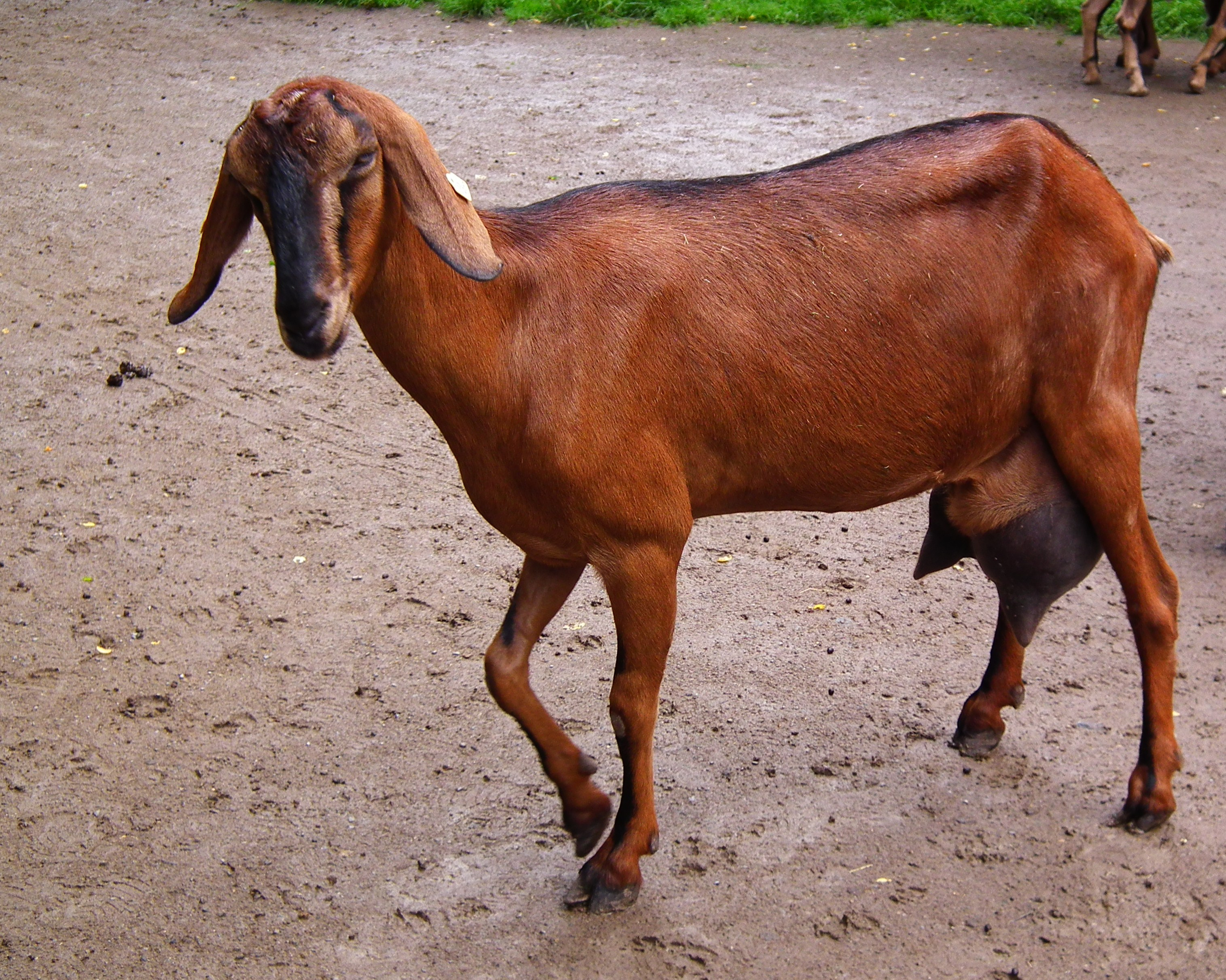 Hausziege (Capra aegagrus hircus), aufgenommen im Wildpark Alte Fasanerie in Klein-Auheim (Hessen, Deutschland)